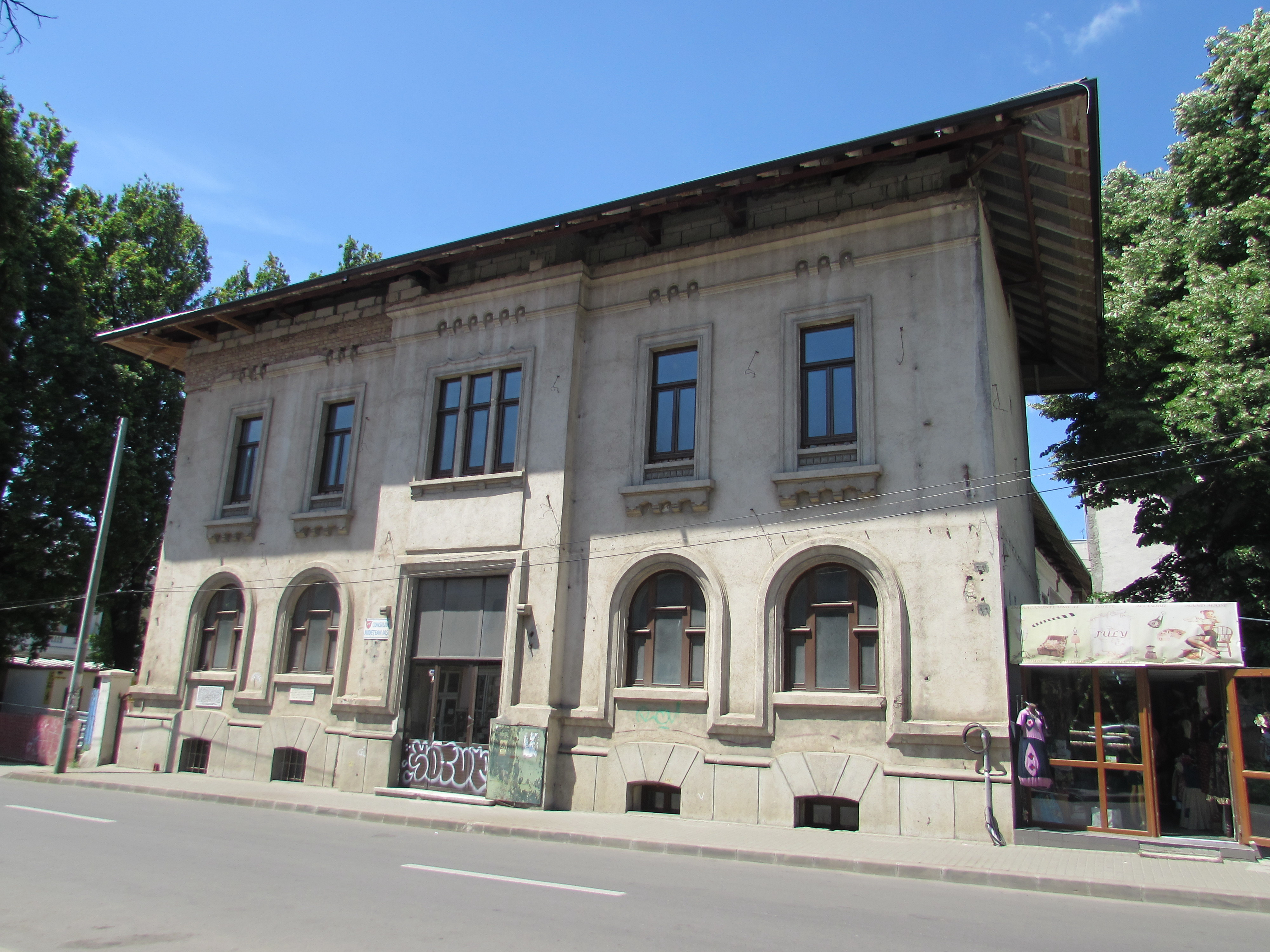 Clădirea revistei Viața Românească din Iași, construită la începutul secolului al XX-lea, care a devenit în 1934 sediul Chesturii de Poliție din Iași, clădire monument istoric. În curtea acestei clădiri au fost asasinați câteva sute de evrei în timpul Pogromului de la Iași.